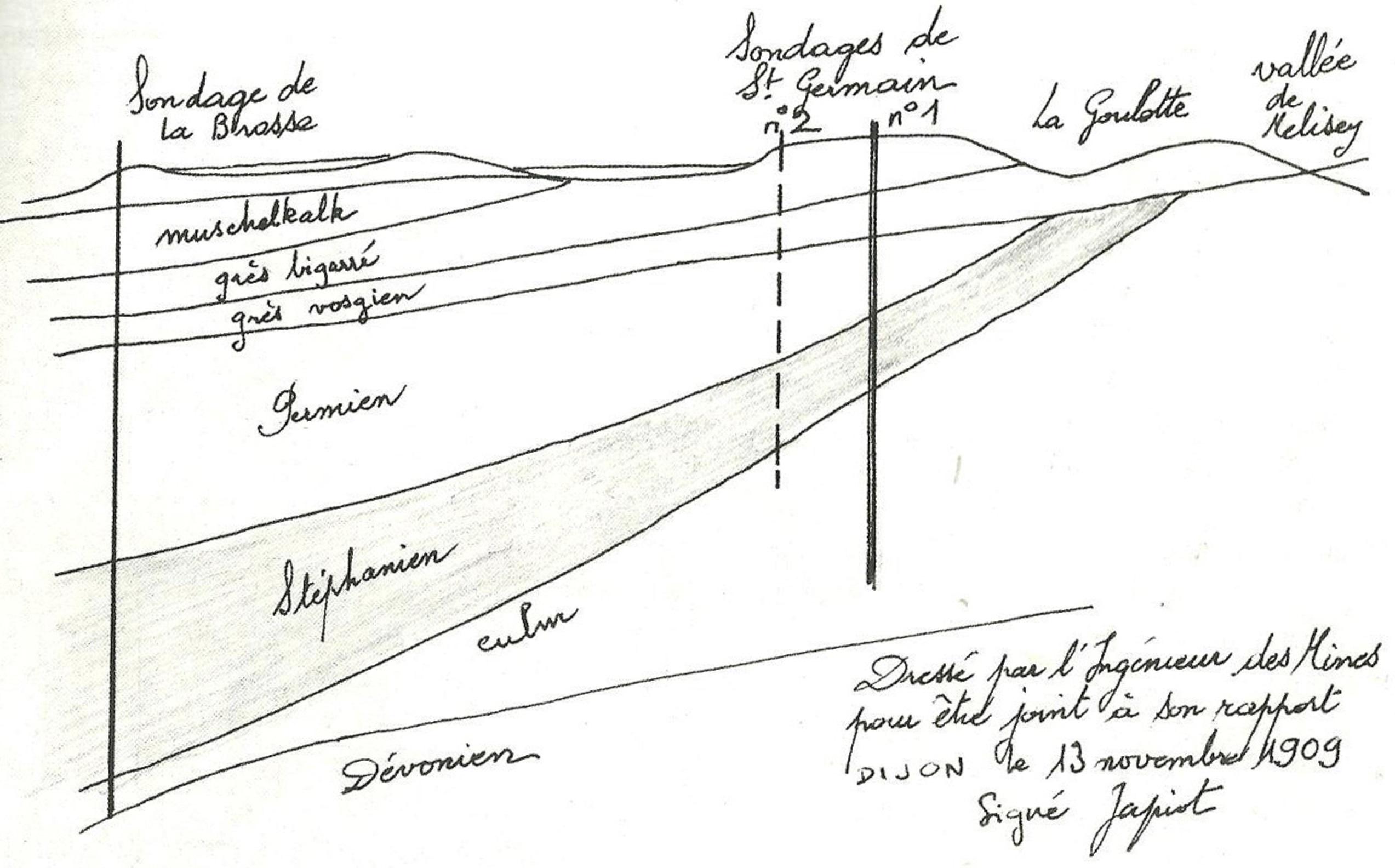 Coupe géologique du bassin houiller Stéphanaien de Saint-Germain.